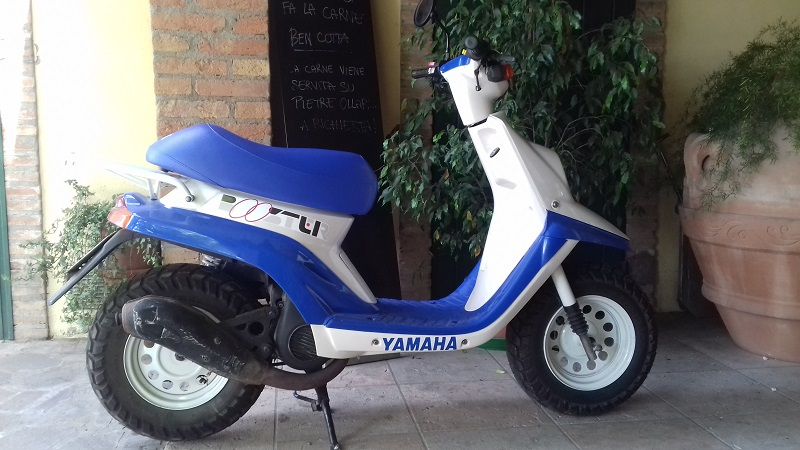 Booster Prima serie del 1991 versione Bianco e Blu prodotto solo negli anni 1990/91